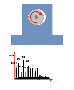 Errotatzen den elementu eta elementu finkoaren arteko lasaiera eta bere espektroa